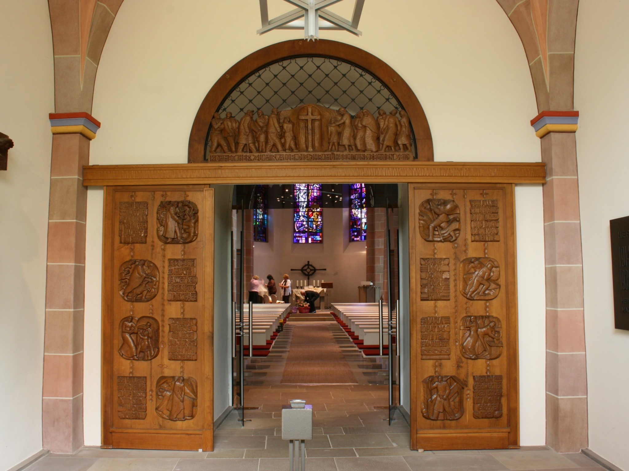 Jesus-Christus-Kirche in Meinerzhagen